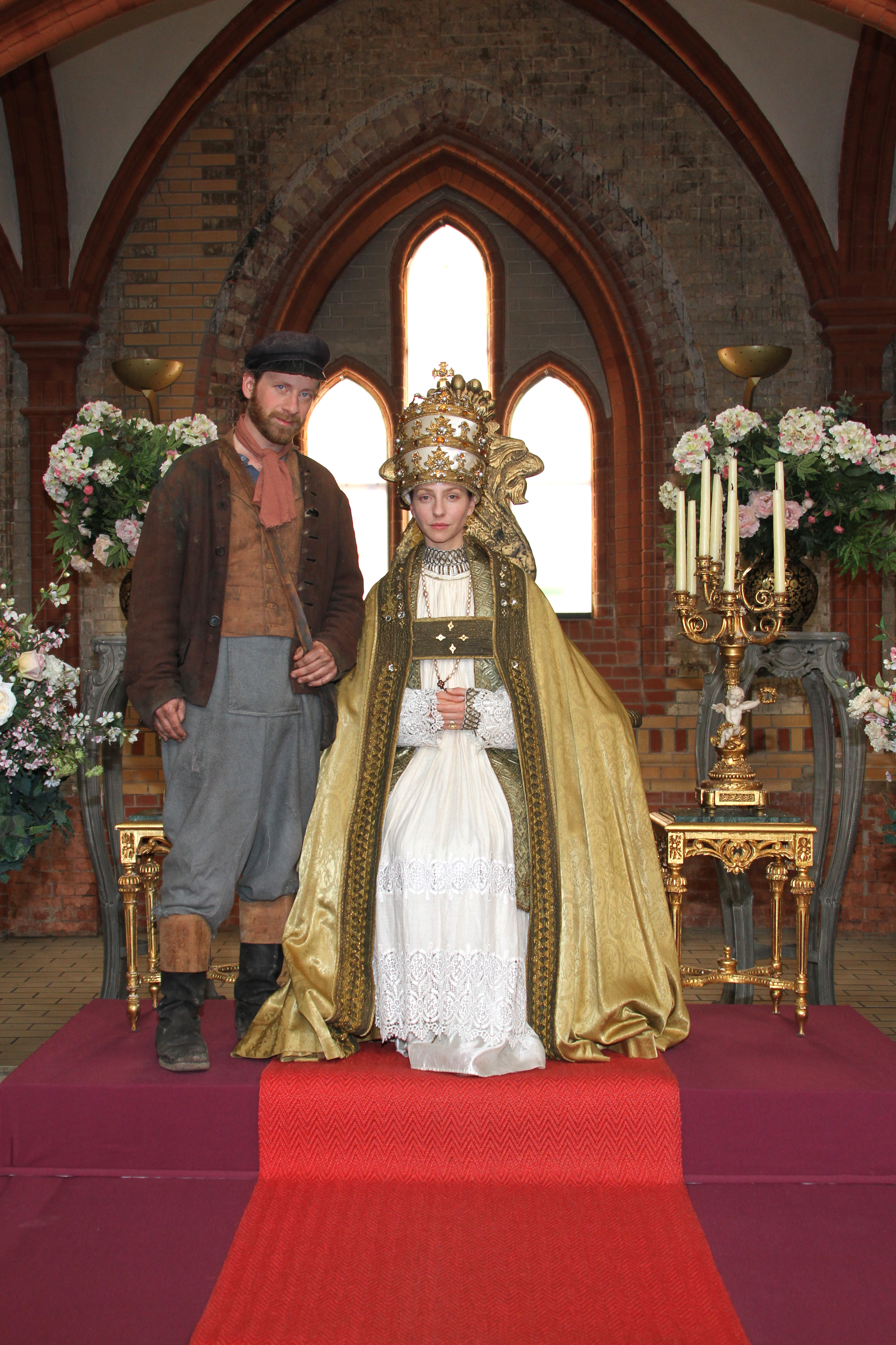 Fabian Busch als Fischer Hein und Katharina Schüttler als Ilsebill im Juni 2013 während der Dreharbeiten zum Film Vom Fischer und seiner Frau, der im Rahmen der ARD-Märchenreihe Sechs auf einen Streich entsteht.